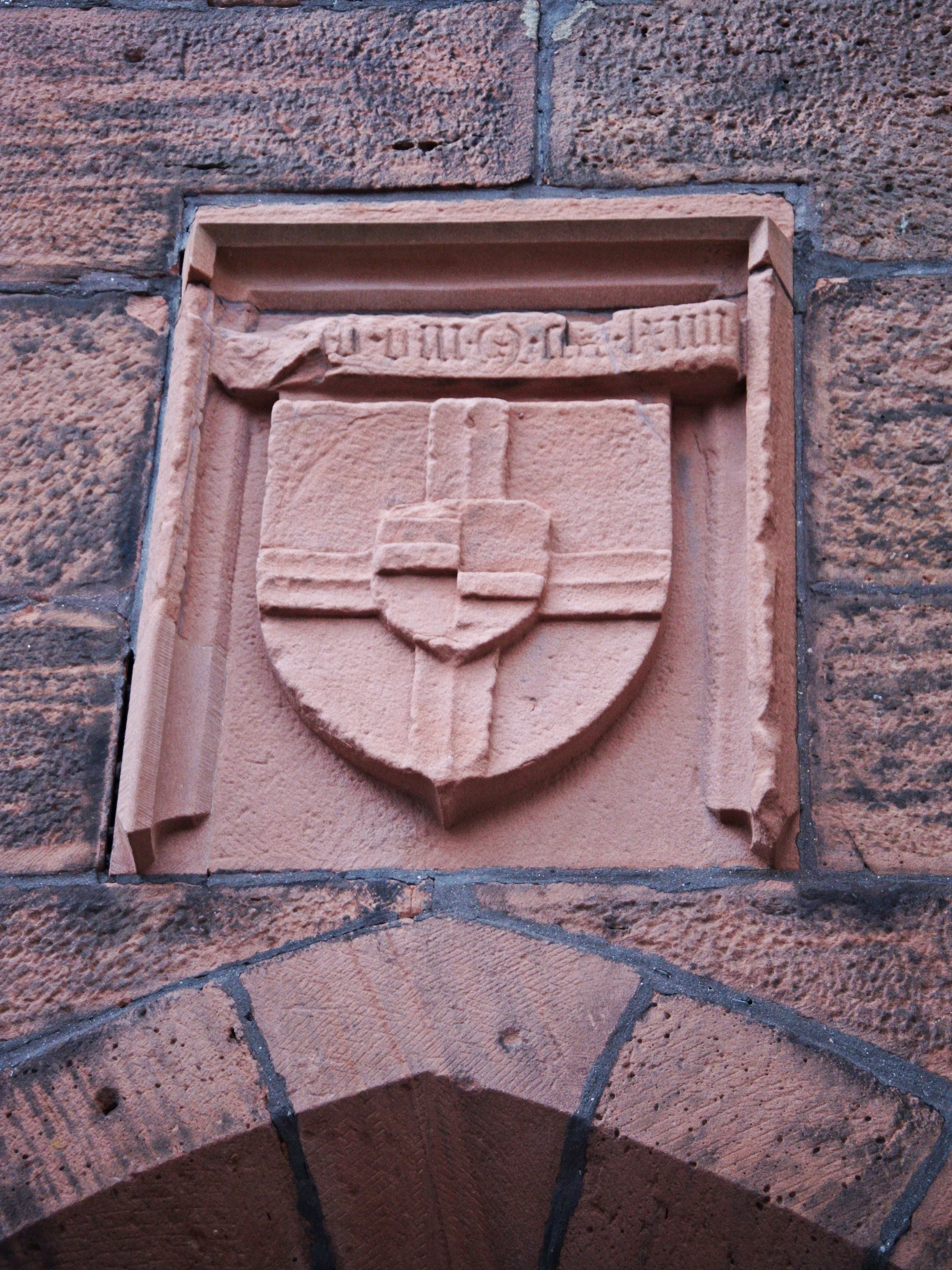 Wappen des Speyerer Bischofs Johann Nix von Hoheneck, Außenseite der Pfarrkirche St. Ulrich, Deidesheim